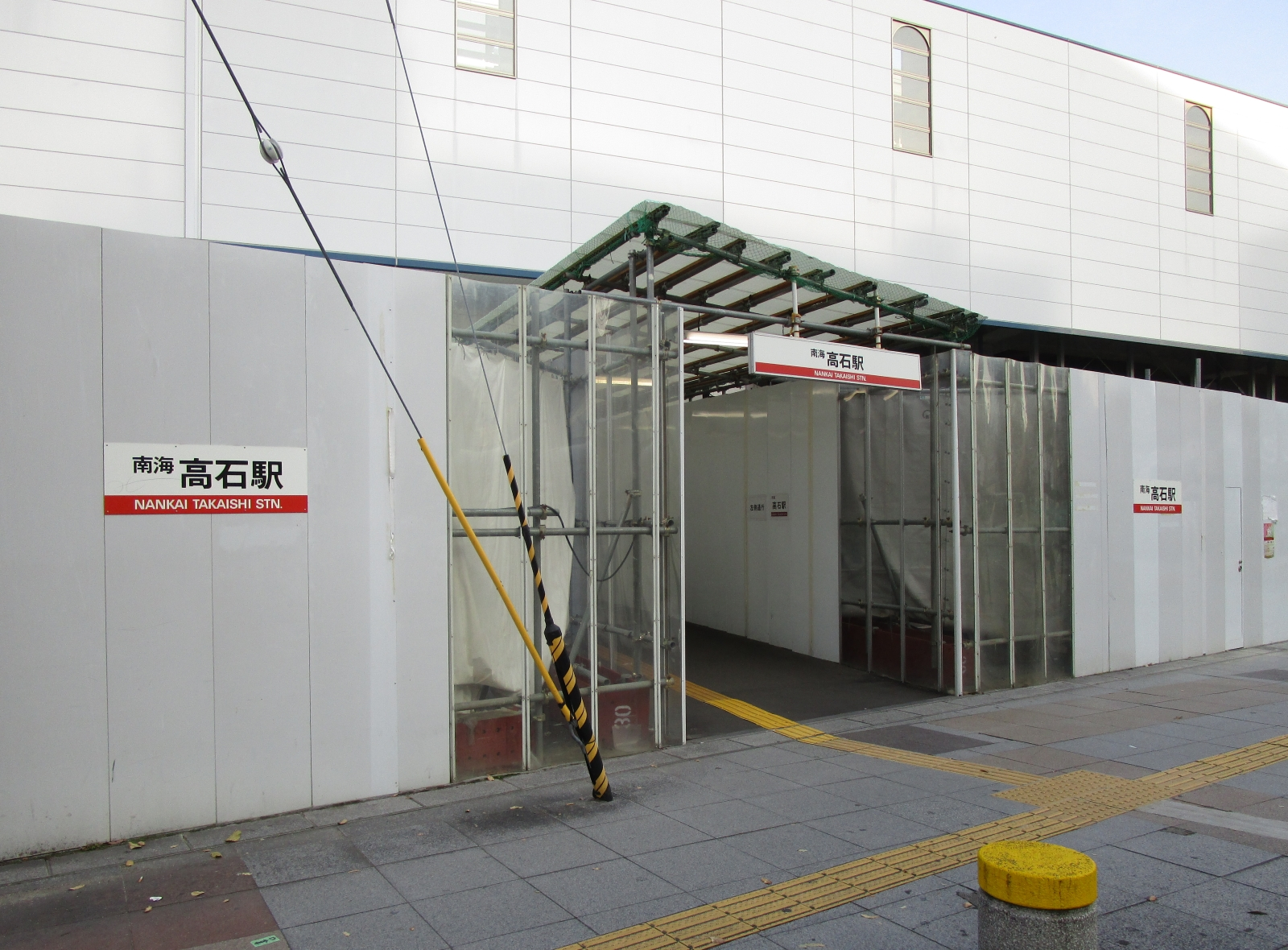 高架工事中の高石駅東口（2017年11月時点）